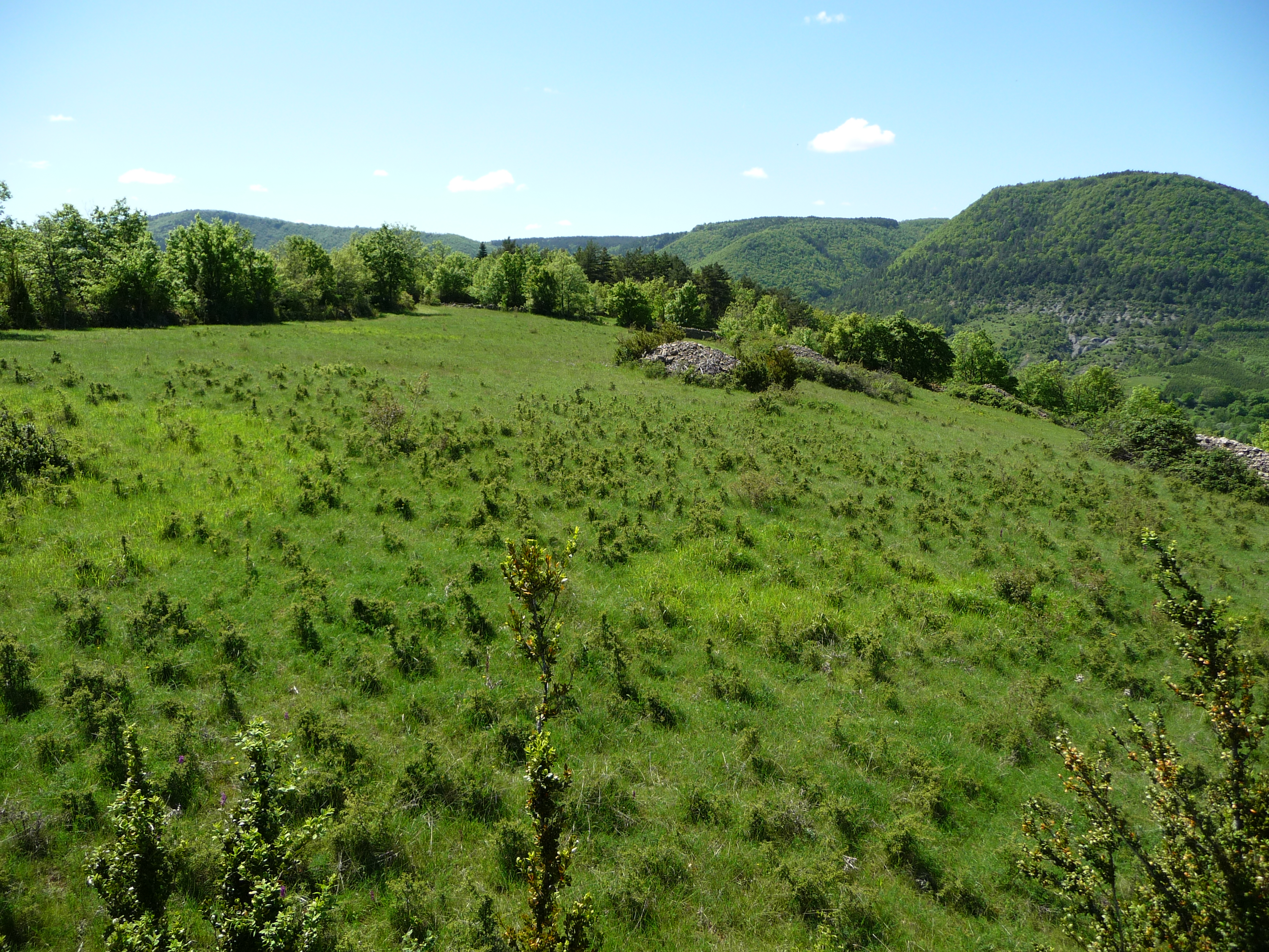 Una caucina. En facia, lo replanièr del Larzac, païs de Rocafòrt.